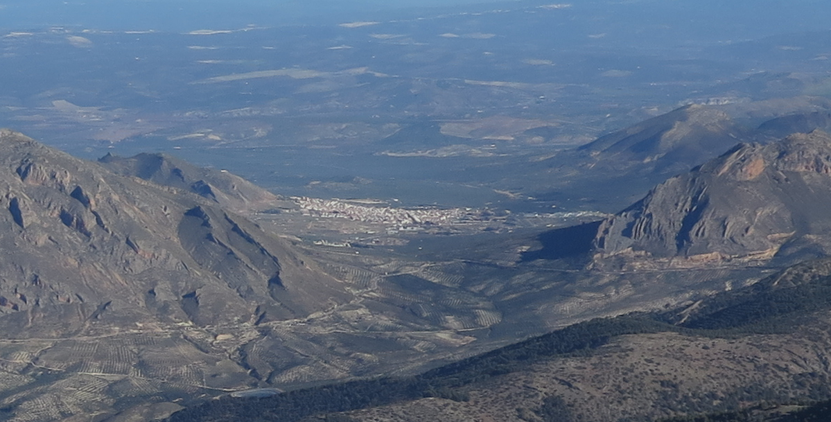 Vista lejana de Jódar desde el Pico Miramundos.